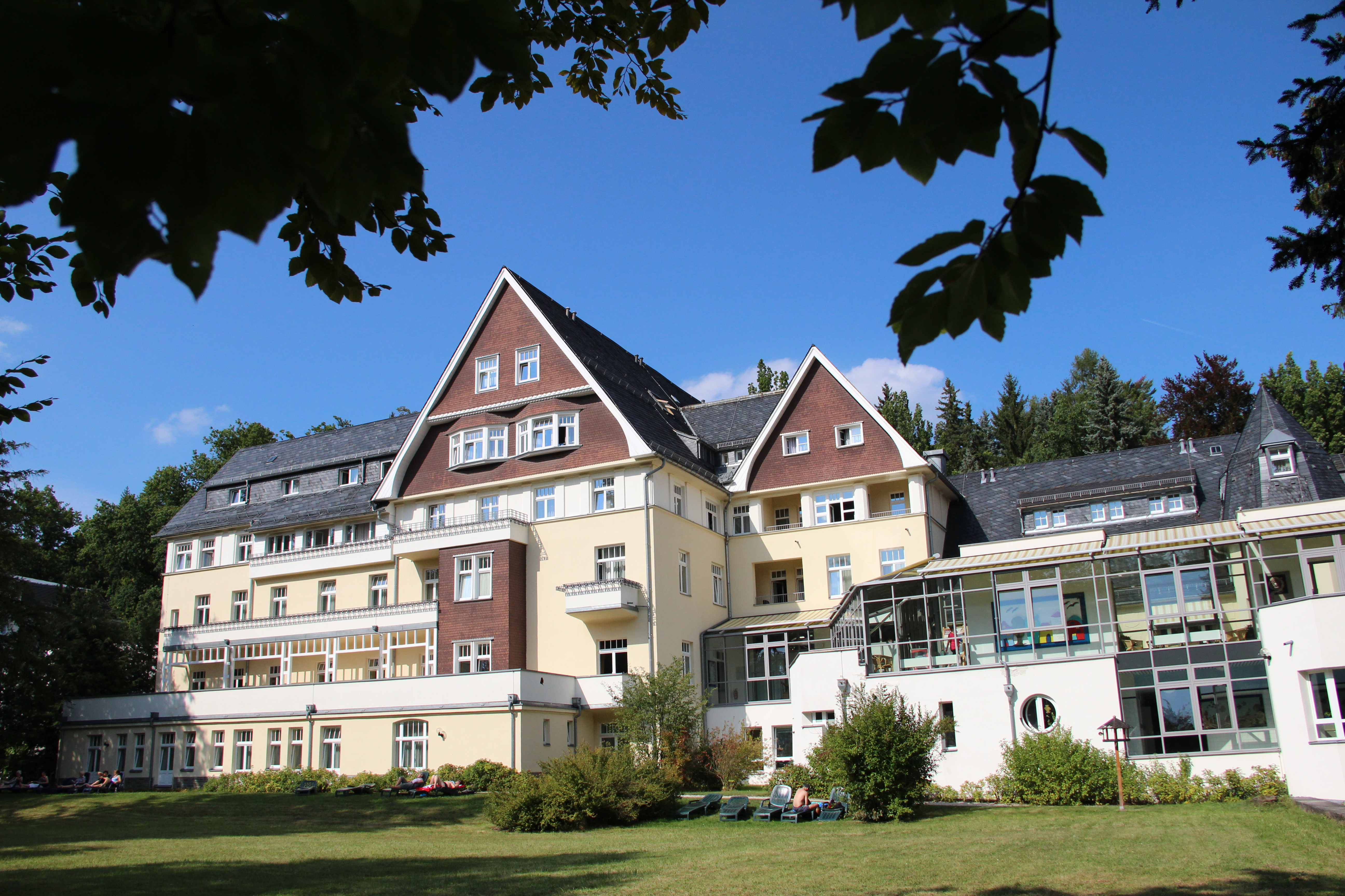 DEKIMED, Deutsche Klinik für integrative Medizin und Naturheilverfahren in Bad Elster (Vogtland, Sachsen)